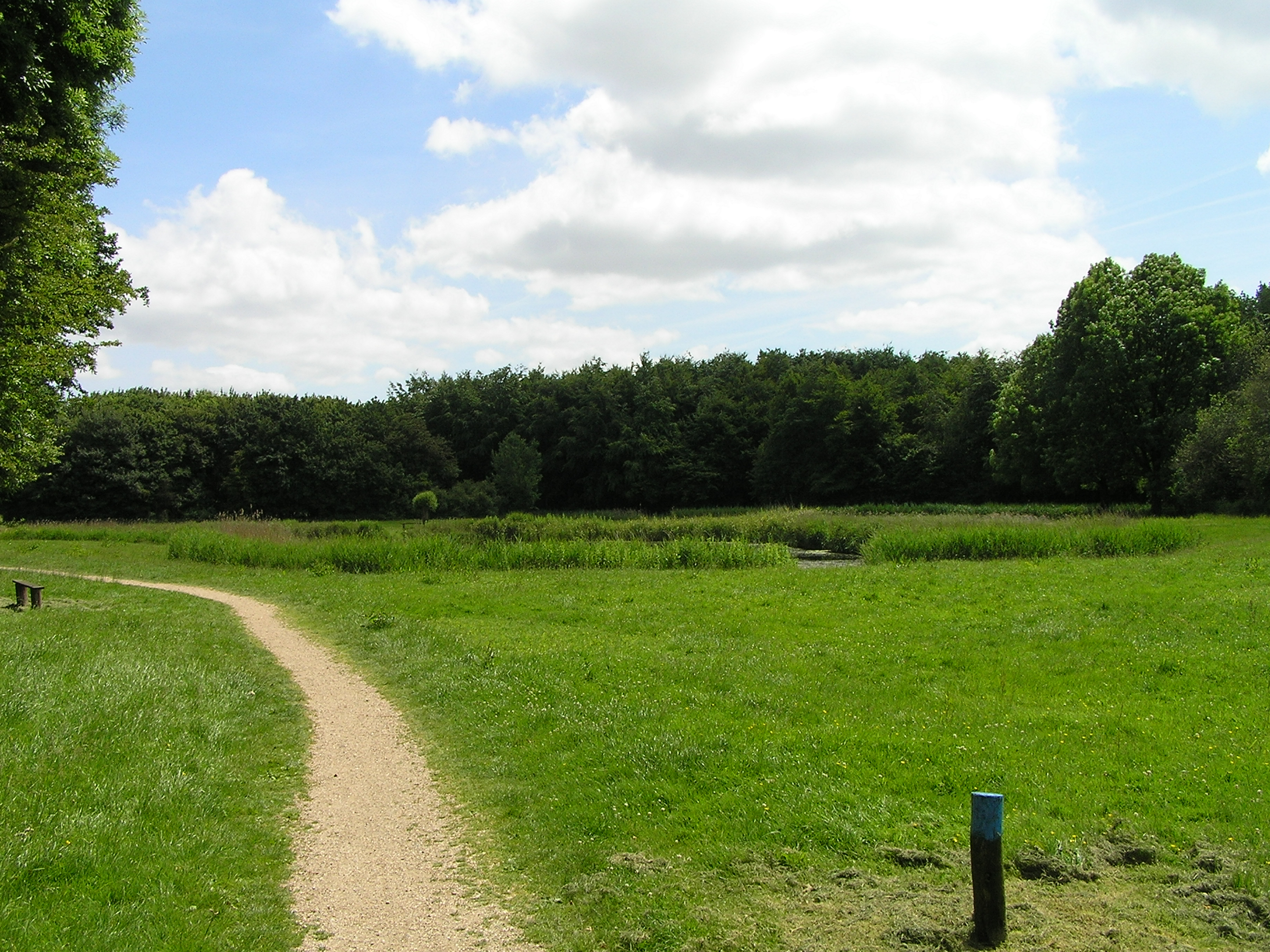 Het Poelbos in de gemeente Goes, Nederland.